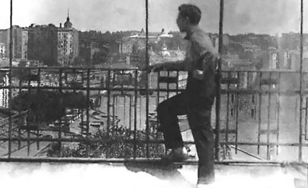 Вид на Хмарочос Гінзбурга. Панорама центру міста — з солярія на даху будинку по вул. Прорізній, 18 (тепер 20). Ліворуч — «Будинок Гінзбурга». У центрі - батько автора